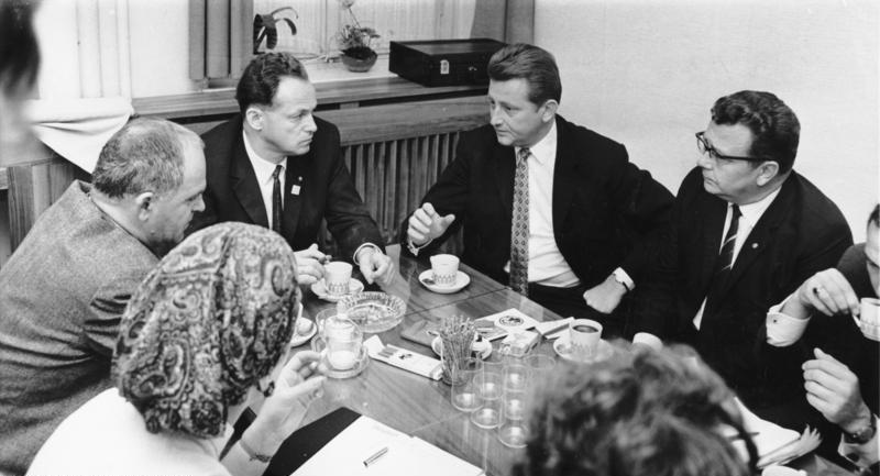 Glauchau, Weberei Nitzschke KG Zentralbild/Thieme 2.10.1968 In Vorbereitung des Jahrestages der DDR Karl-Marx-Stadt: Mechanische Weberei Nitzschke & CO KG entwickelte sich nach Aufnahme staatlicher Beteiligung zu bedeutendem Exporteur Gottfried Engelmann, Komplementär der Mechanischen Weberei Nitzschke & Co KG Glauchau (Zweiter v.r.) auf der Herbstmesse 1968 in Leipzig im Gespräch mit Dr. Manfred Gerlach, Stellvertreter des Vorsitzenden des Staatsrates und Vorsitzender des Zentralvorstandes der LDPD (zweiter v.l.), über Probleme der Gemeinschaftsarbeit. Gottfried Engelmann (LDPD) ist Stellvertreter des Vorsitzendes des Rates der Erzeugnisgruppe Kammgarngewebe und Kleiderstoffe. "Ich sehe in dieser Funktion die Aufgabe, mit Wege zu suchen, damit die 36 Betriebe der Erzeugnisgruppe unter Berücksichtigung der gesellschaftlichen wie der einzelnen Interessen eine hocheffektive Wirtschaftseinheit bilden", meint Diplom-Ökonom Engelmann. Seit Aufnahme der staatlichen Beteiligung im Jahre 1958 konnte sein Betrieb, der Stoffe aus reiner Zellwolle und Mischpolyester herstellt, seinen Umsatz mehr als verzehnfachen und sich zu einem bedeutenden Exporteur entwickeln. Seine Erzeugnisse gehen in über 25 Länder. G 1002/20/1N